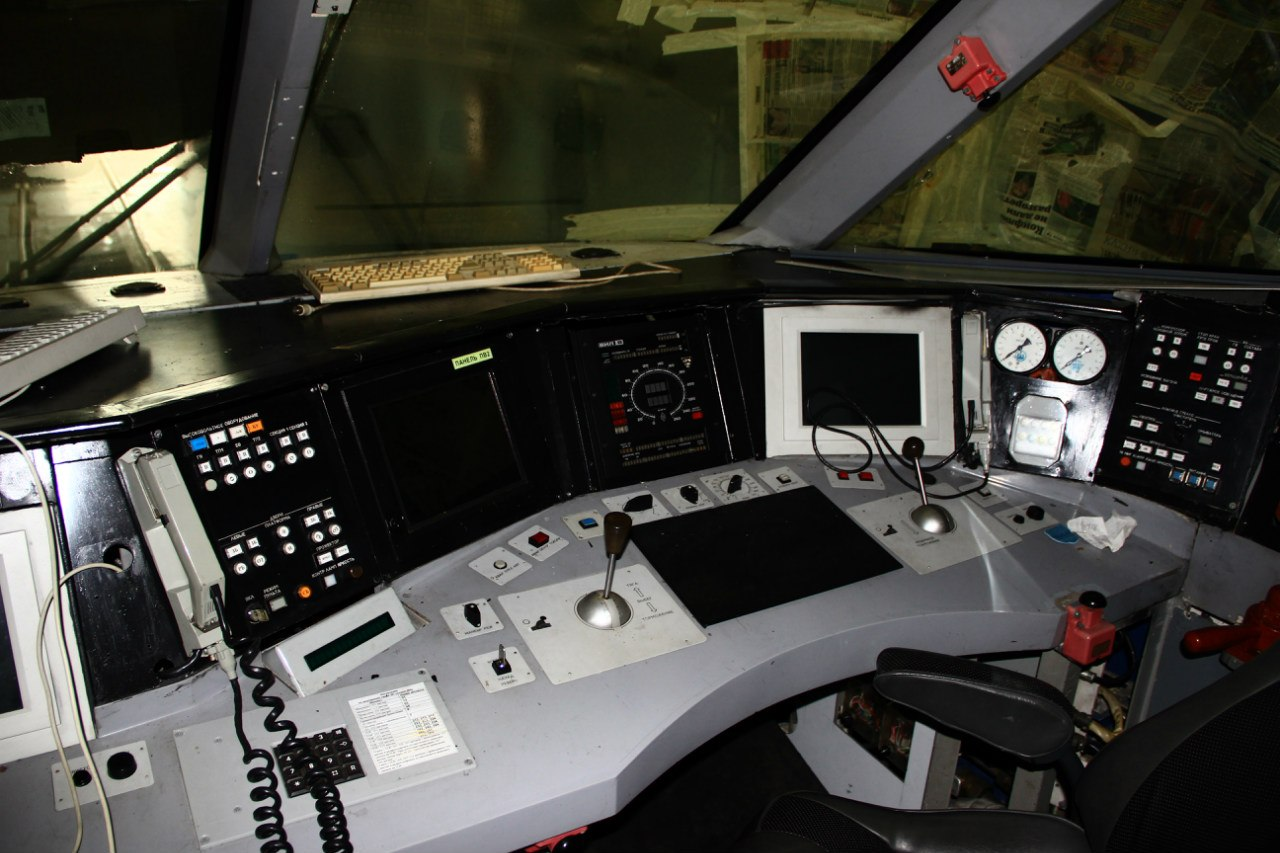 ЭС250 "Сокол"(кабина)